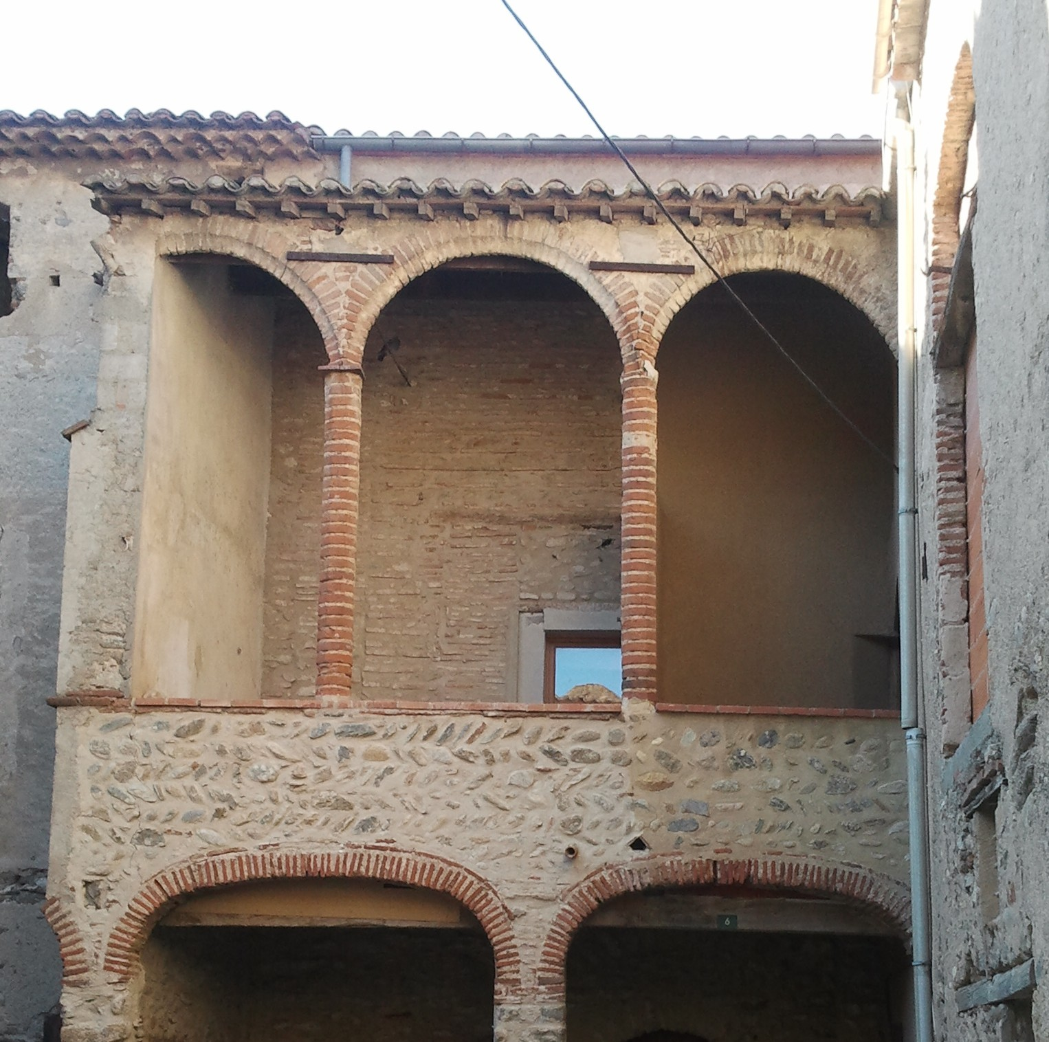 Vestiges du château à Saint-Jean-Pla-de-Corts